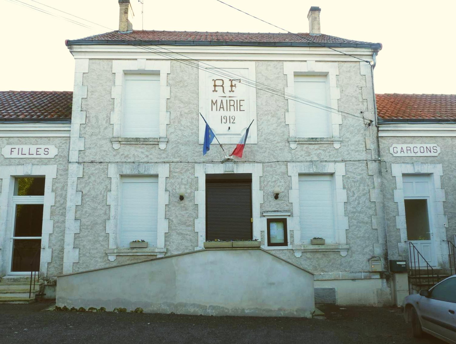 mairie de Fontenille, Charente, France